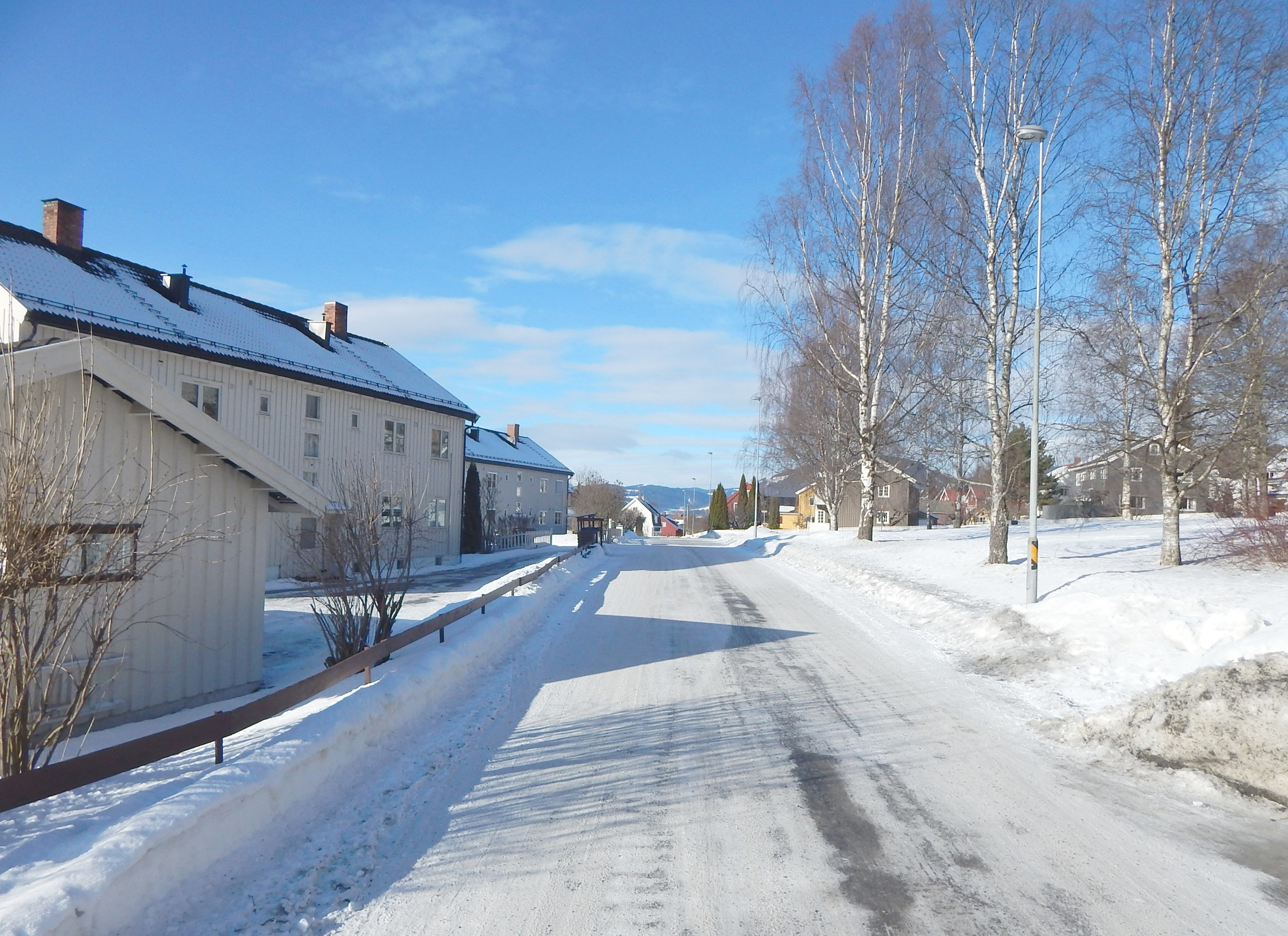 Møinichens gate på Lillehammer